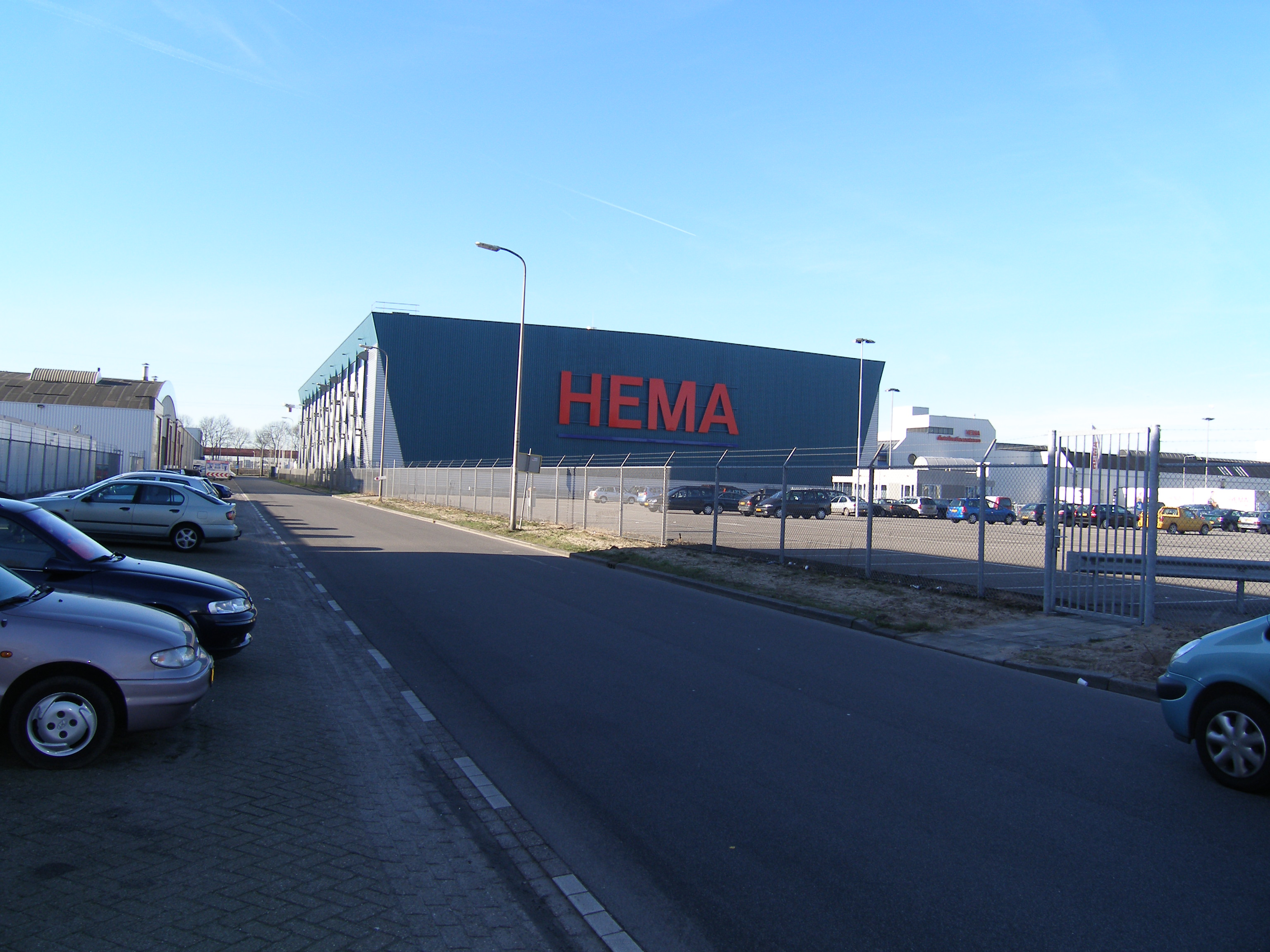 HemaLage Weide